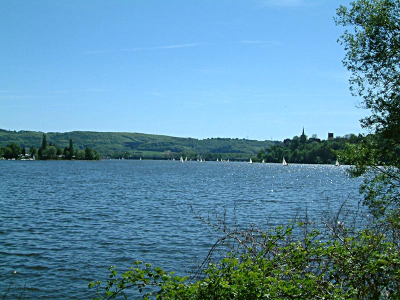 Panorama des Harkortsees Richtung Wetter Andere Versionen: keine